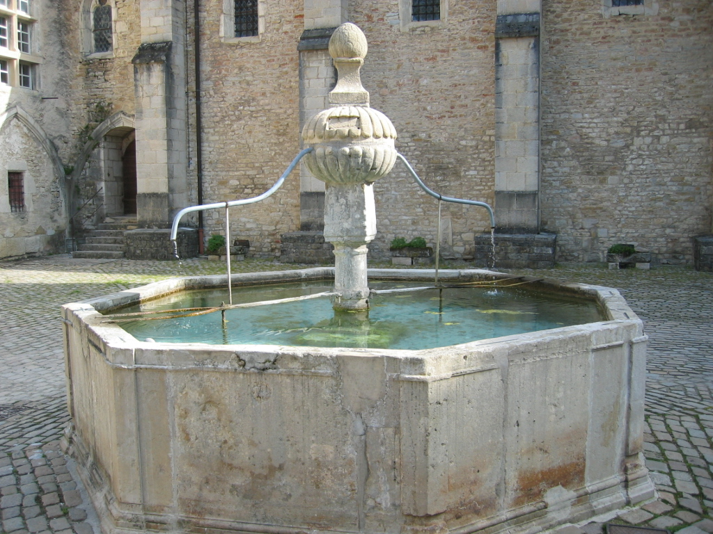 Baume les Messieux - Franche Comté - France